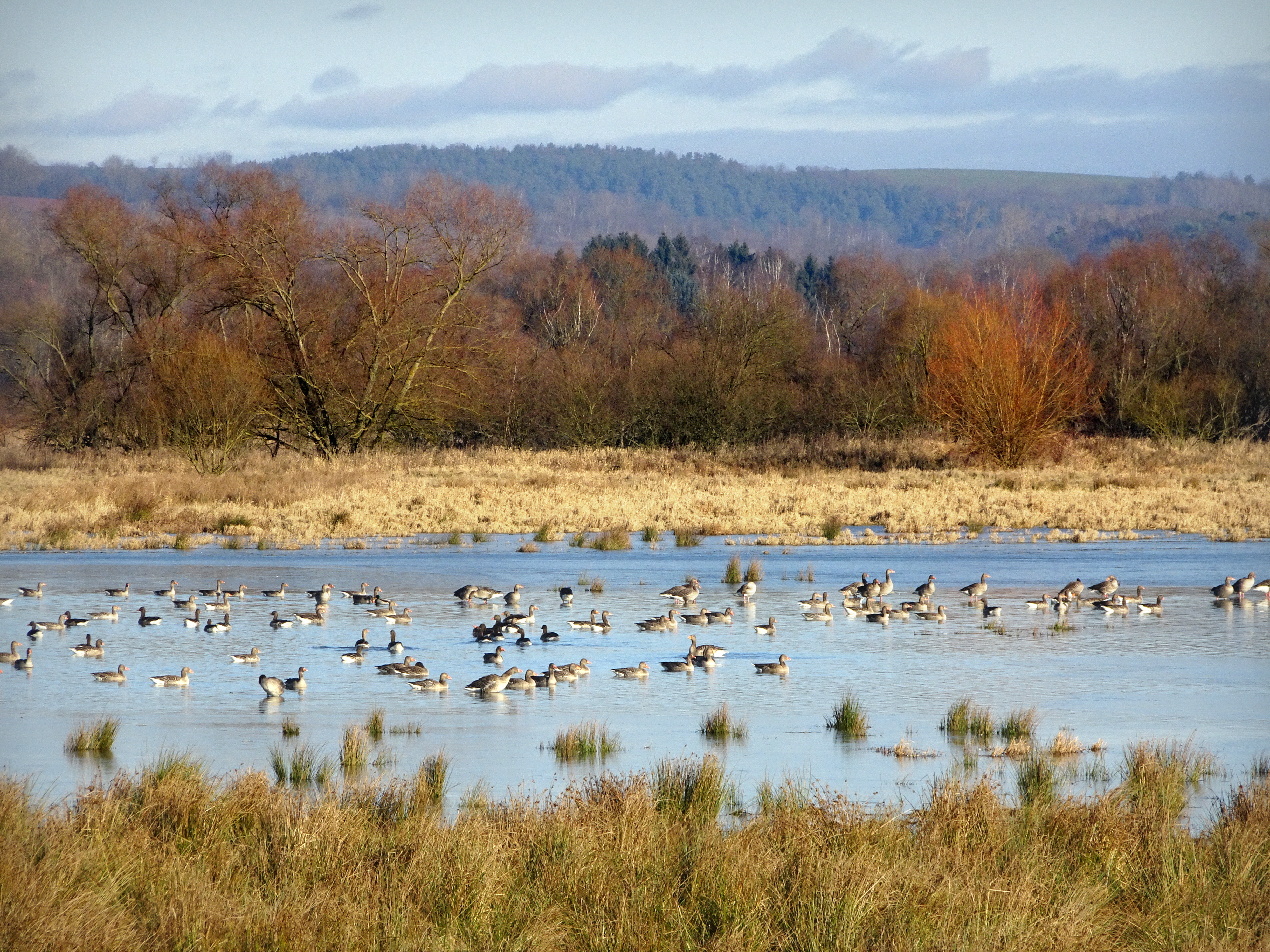 Graugänse (Anser anser) im Naturschutzgebiet „Dankmarshäuser Rhäden“ im thüringischen Wartburgkreis. Der Bereich gehört auch zum FFH-Gebiet DE-5026-305 „Dankmarshäuser Rhäden“ und zum EU-Vogelschutzgebiet DE-5127-401 „Werra-Aue zwischen Breitungen und Creuzburg“.